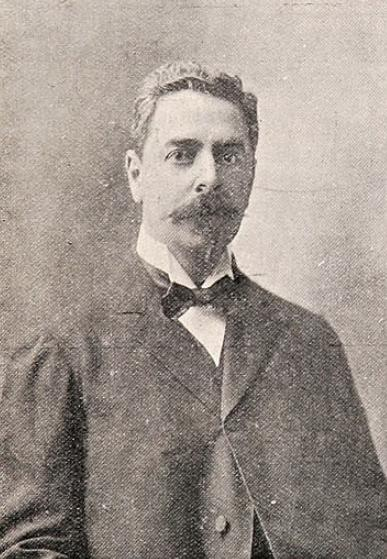 Germán Valenzuela Basterrica Medico cirujano, dentista titulado en París, Director de la Escuela Dental .